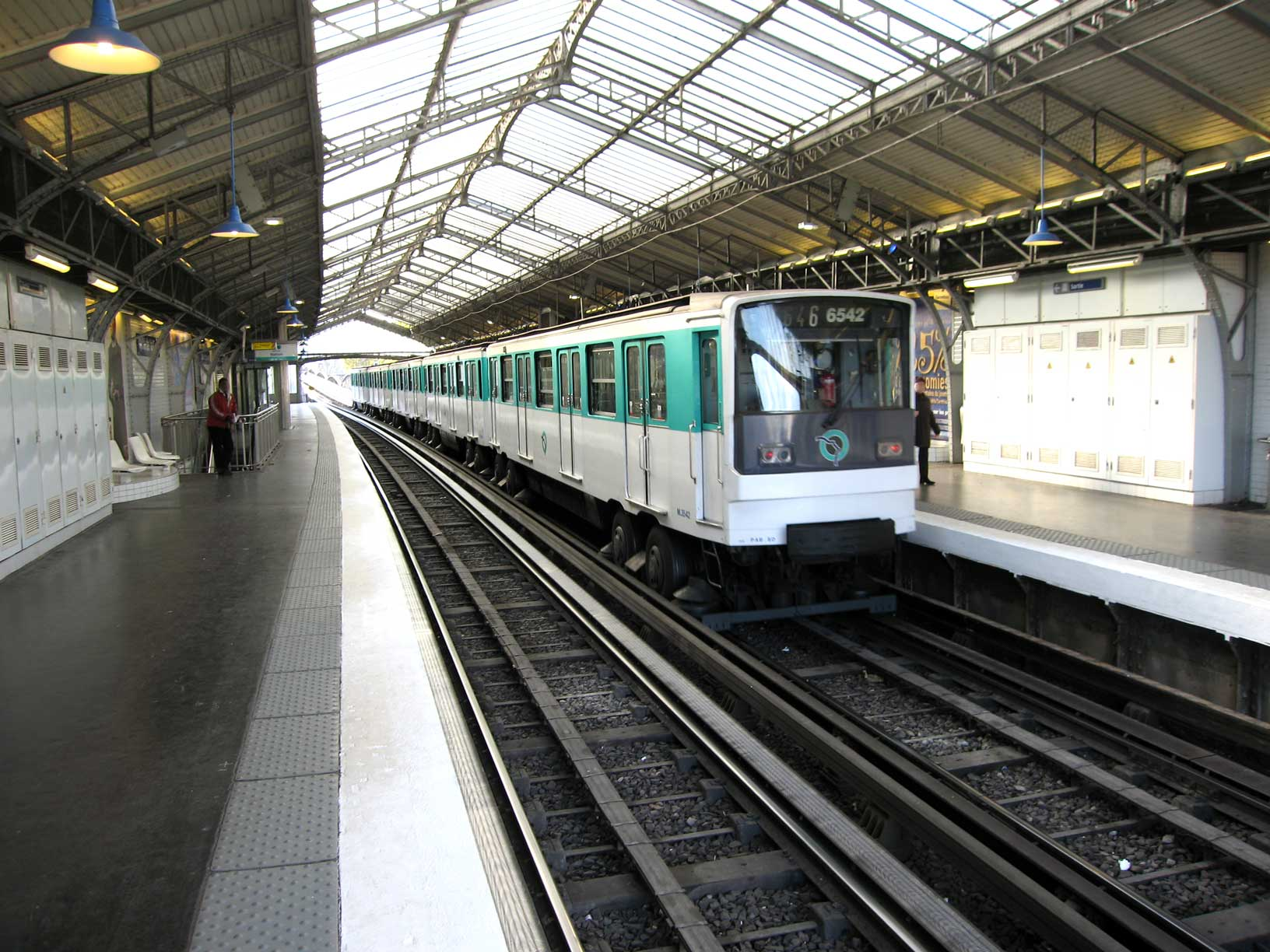 Métro de Paris, Station Quai de la Gare (ligne 6), Paris, France